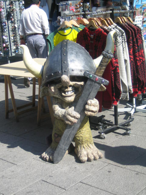 Trollfigur in der Osloer Innenstadt